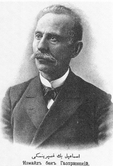 Qırımtatarca: İsmail Gasprinskiy.